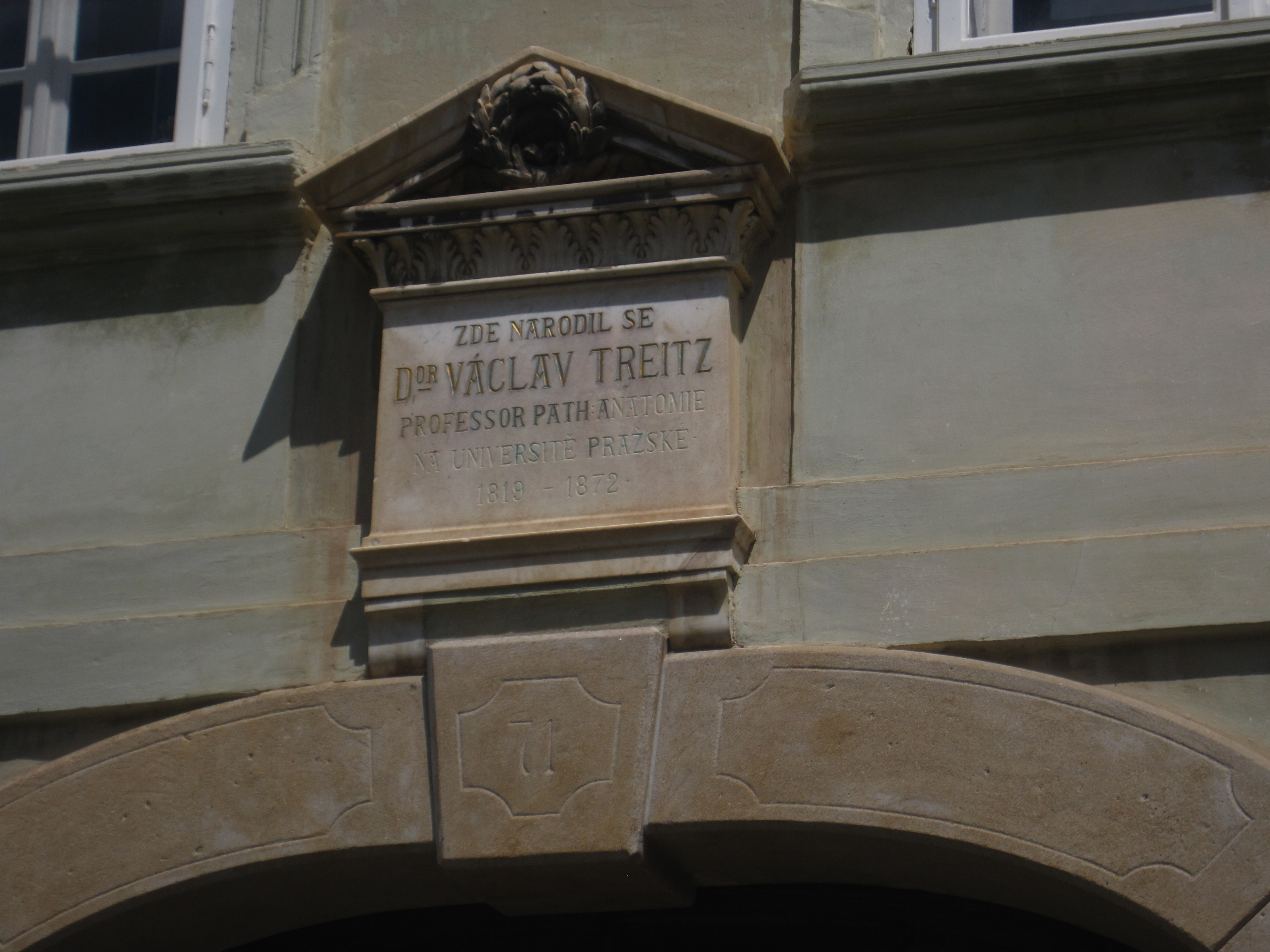 Dům čp. 71, Tyršovo náměstí 71, Hostomice (okres Beroun).